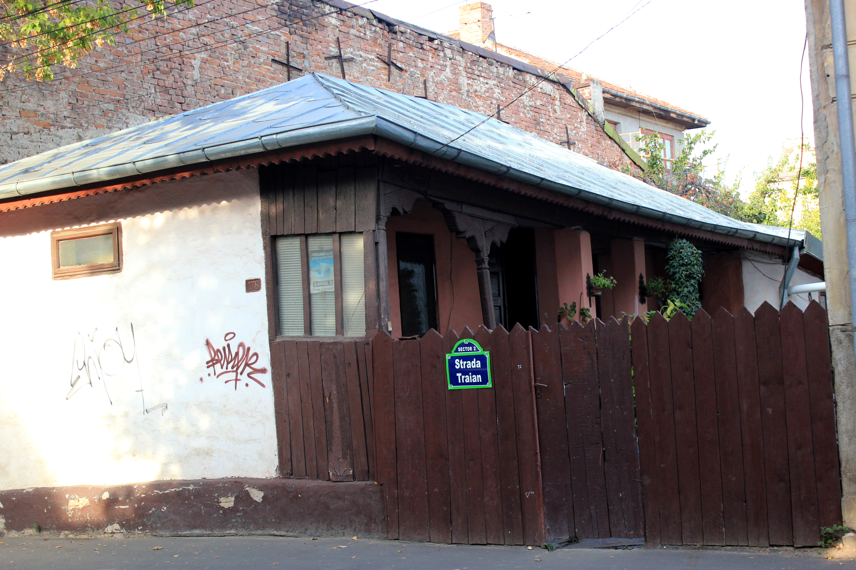 Casă Traian 176